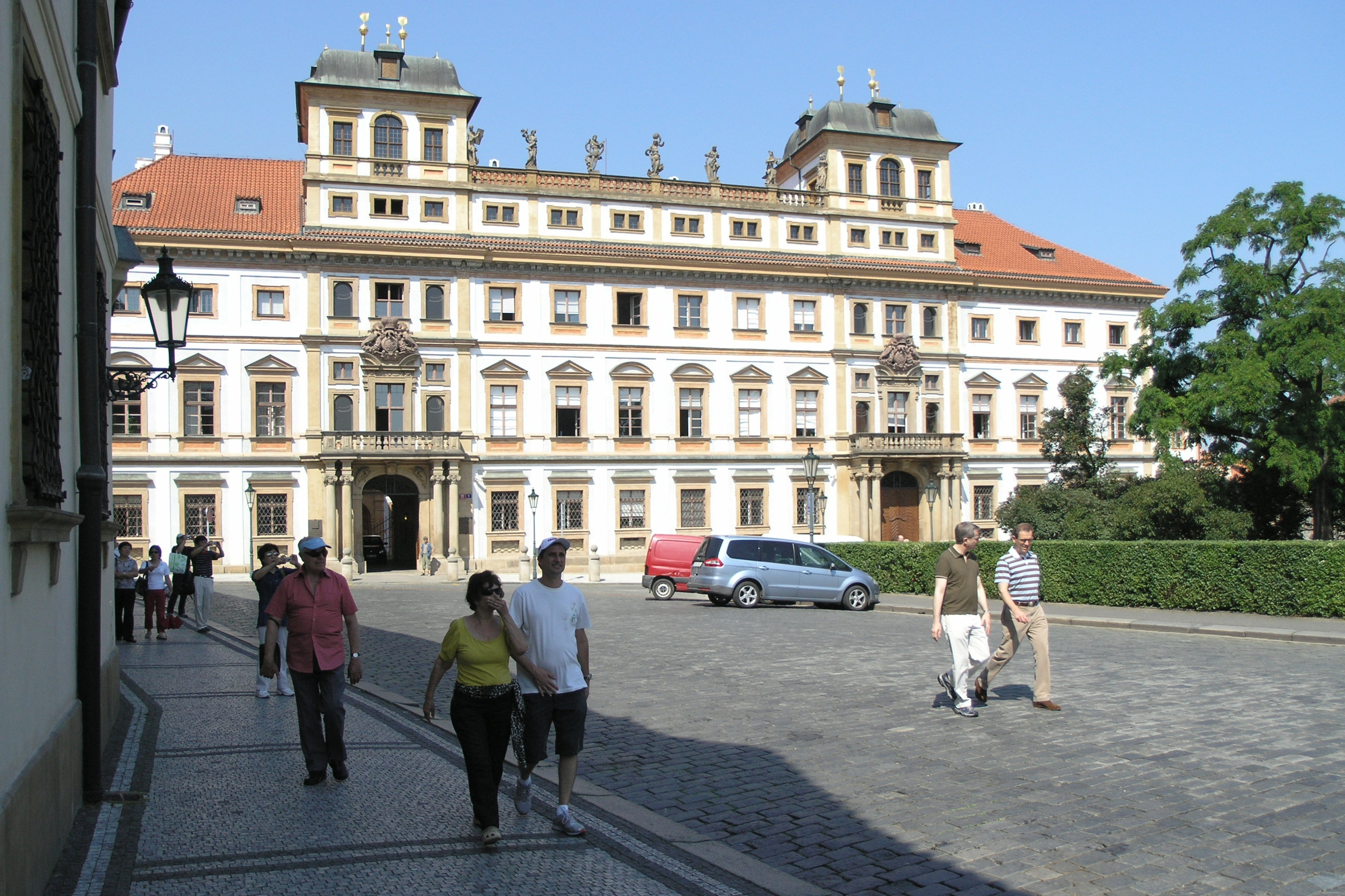 Praha, Hradčanské náměstí - Toskánský palác